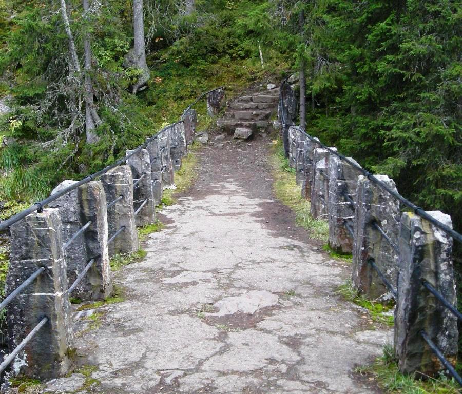 Colletts bro over Mesna ved Lillehammer